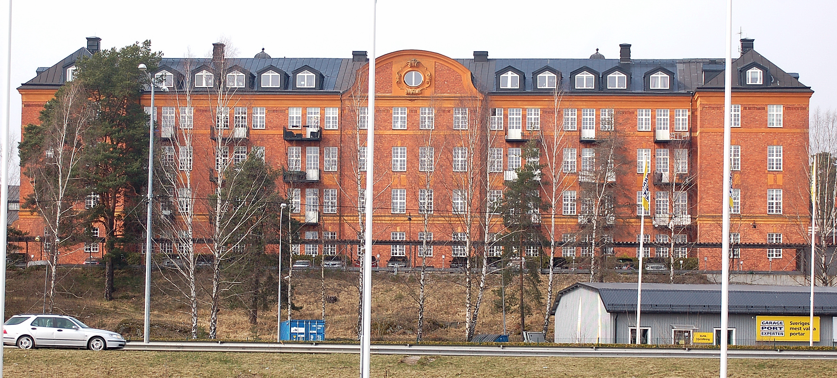 Kasern 3 vid I2 från söder.